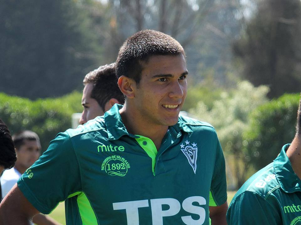 Fotografía del jugador profesional paraguayo, Mario López Quintana. Aquí en el entrenamiento del Santiago Wanderers de Chile.